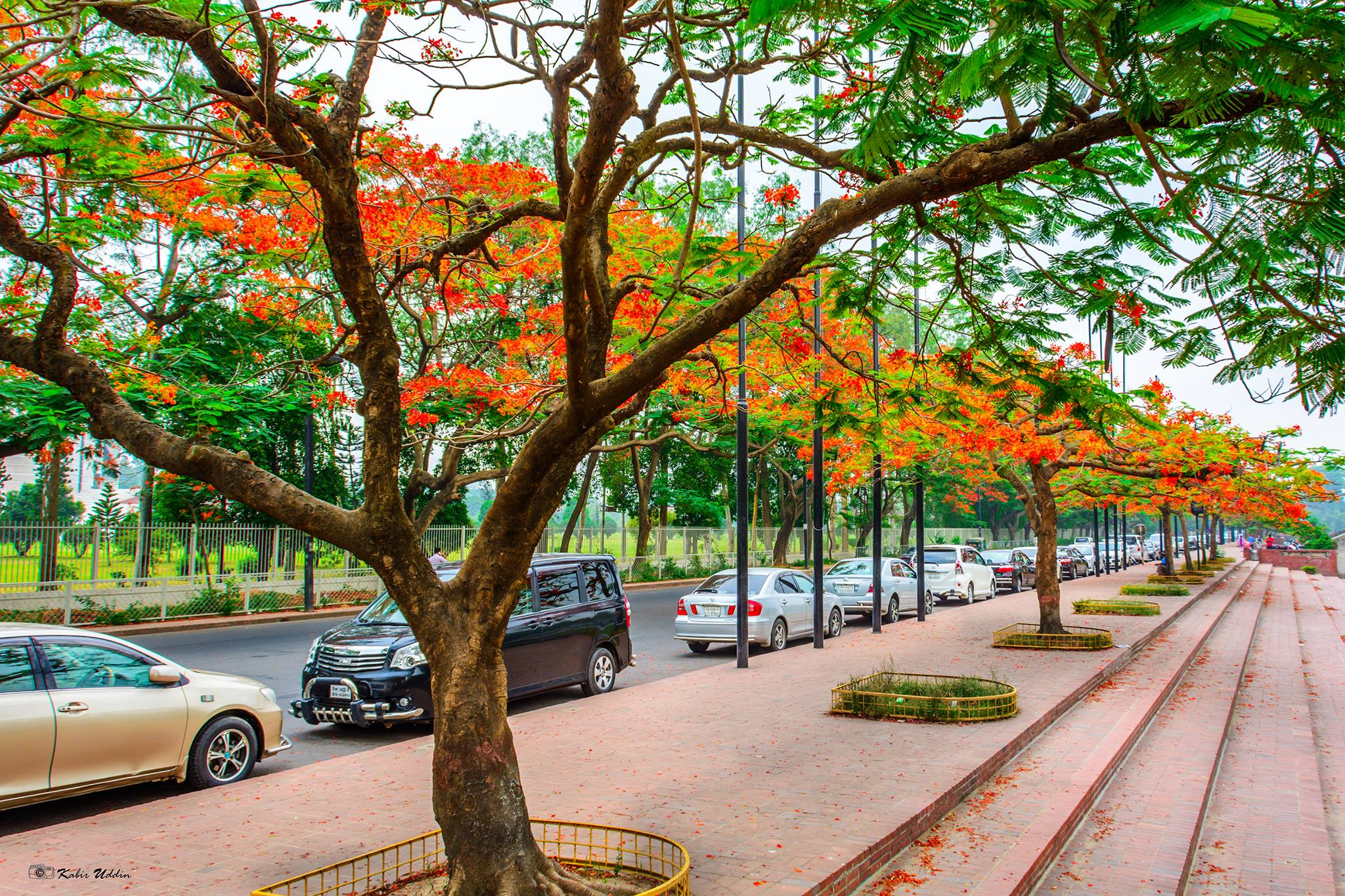 বাংলাদেশ কৃষ্ণচুড়া পুষ্প উত্সব